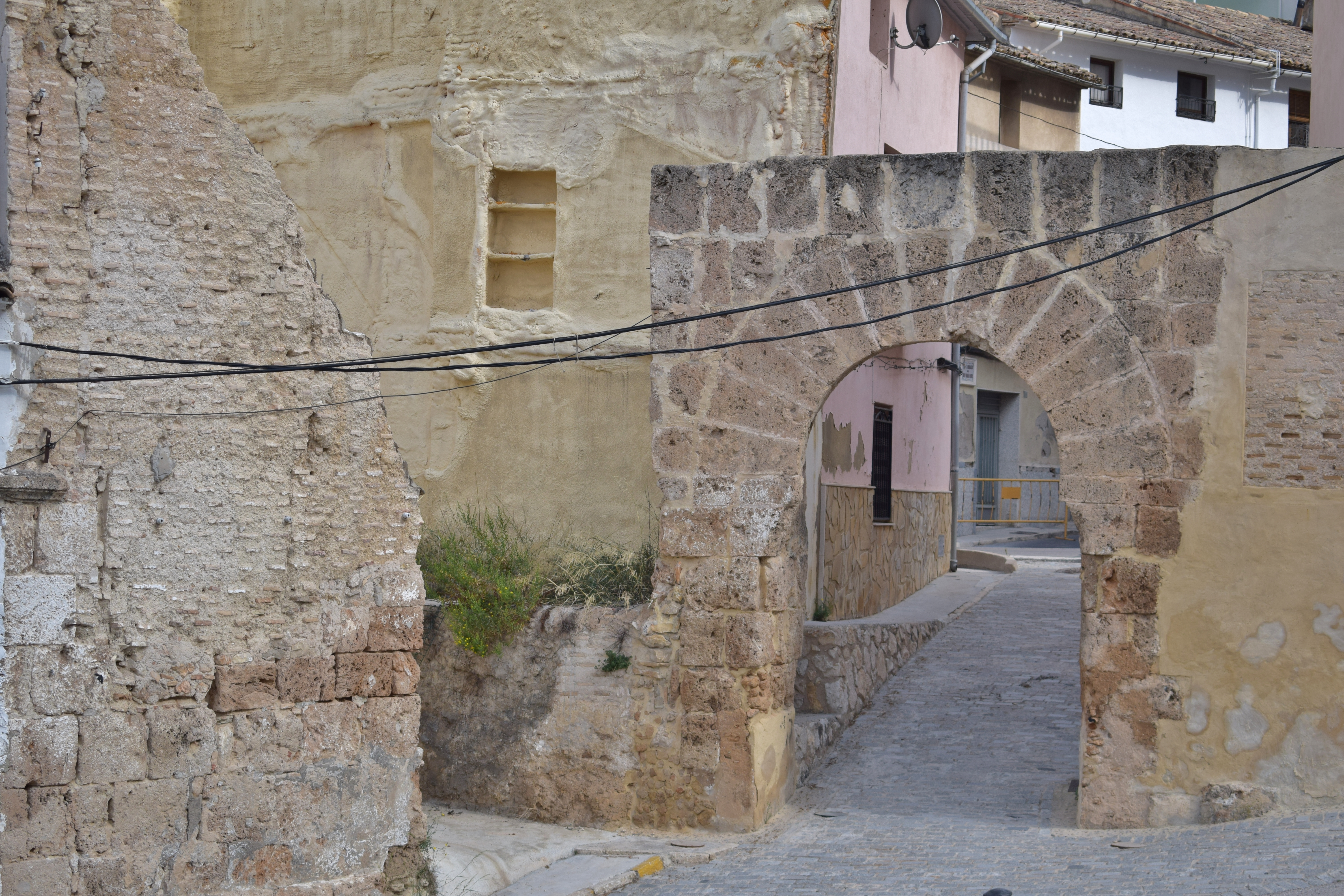 Albaida.